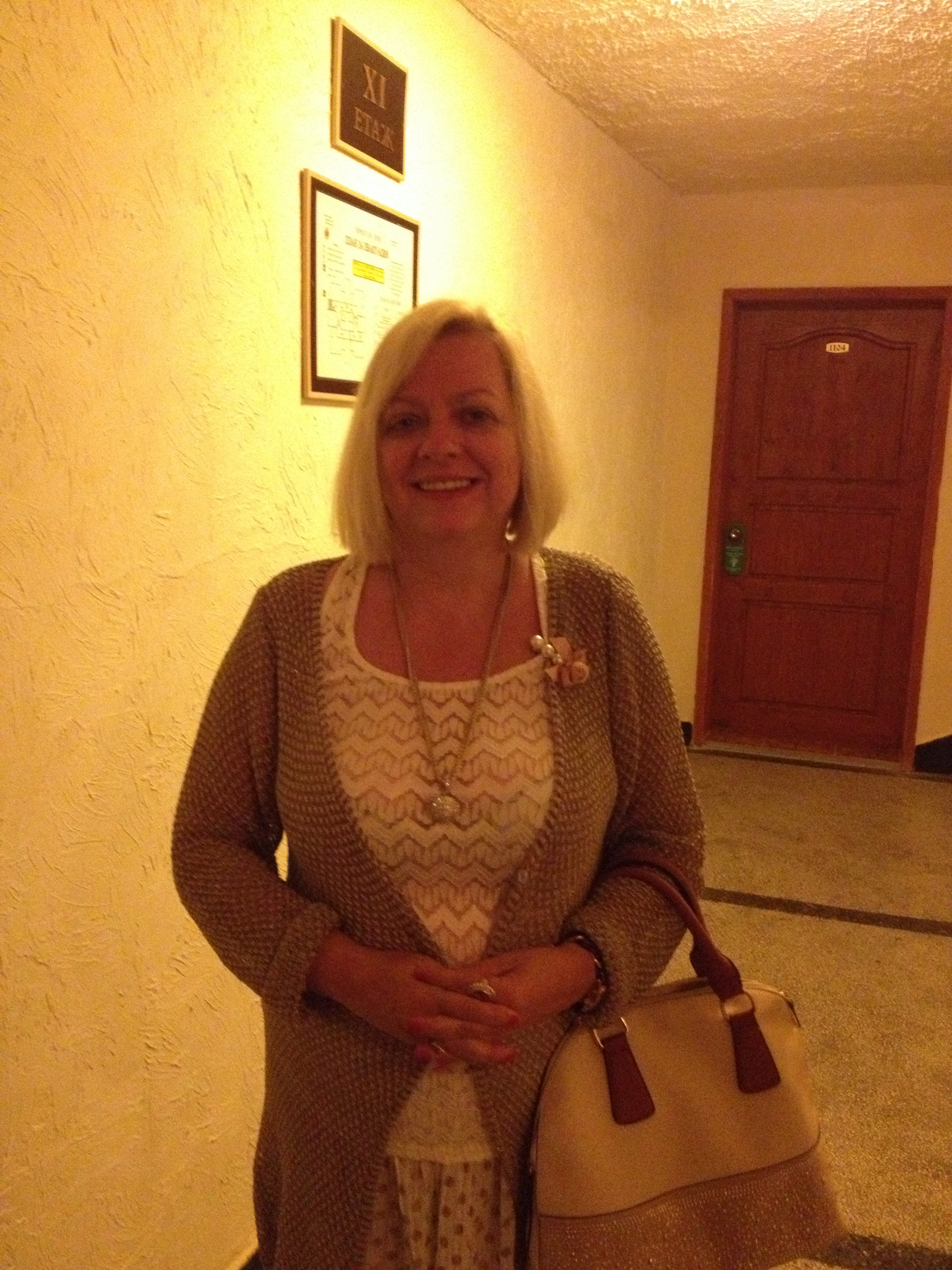 Мирјана Радовић Марковић